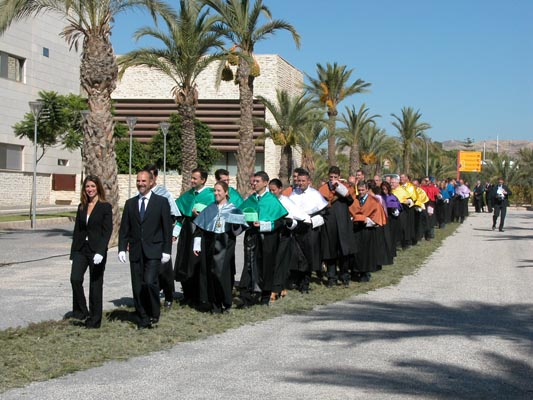 Procesión académica de doctores y doctorandos en la Universidad Miguel Hernández de Elche, España.